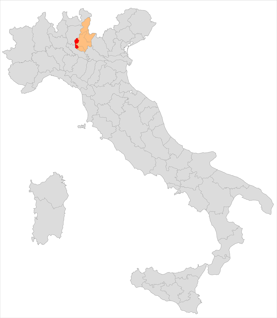 Mappa del circondario di Chiari nella provincia di Brescia (1868-1927)